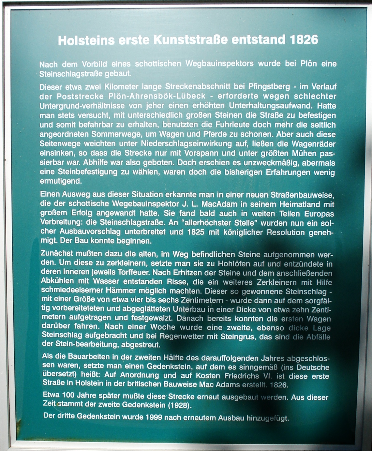 Macadam-Straße_Pfingstberg_-_Infotafel